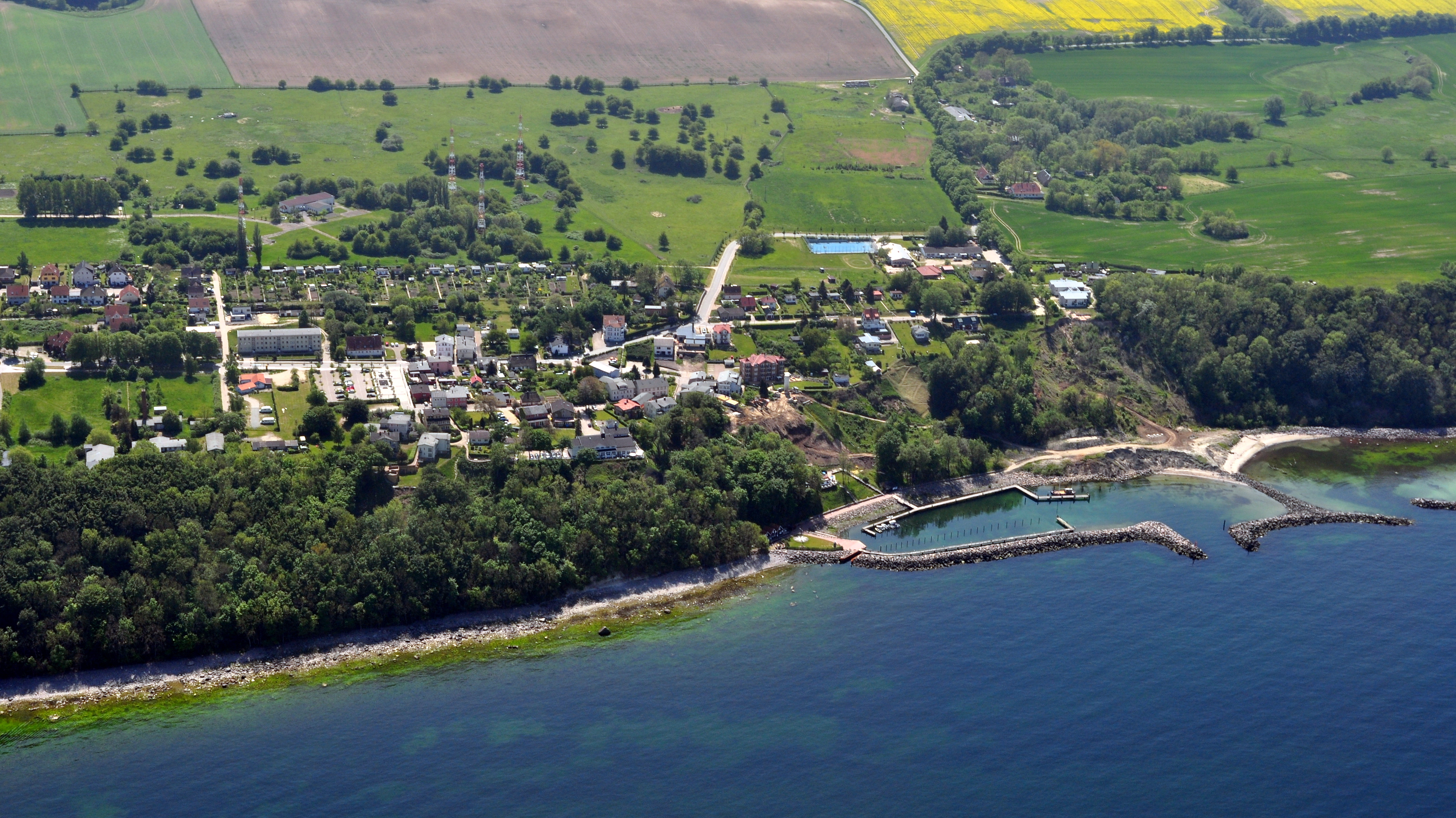 Die Bilder wurden von mir während eines einstündigen Rundflugs ab Flugplatz Güttin am 21. Mai 2011 aufgenommen. Die Bildbeschreibung steht im Dateinamen. Aufgenommen mit einer Nikon D5000 durch das Seitenfenster des Flugzeugs.